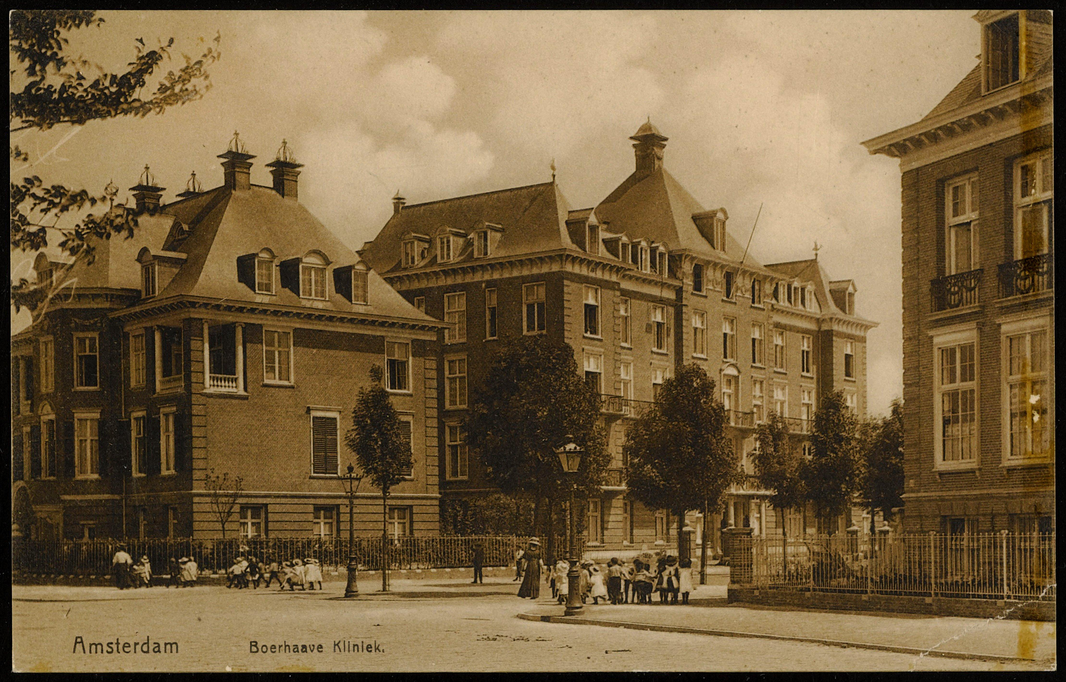 Beschrijving Museumplein hoek Teniersstraat. Boerhaave Kliniek Documenttype prentbriefkaart Vervaardiger Onbekend Anoniem Collectie Collectie Stadsarchief Amsterdam: prentbriefkaarten Datering 1910 Geografische naam Museumplein Inventarissen Afbeeldingsbestand PRKBB00492000019 Generated with Dememorixer